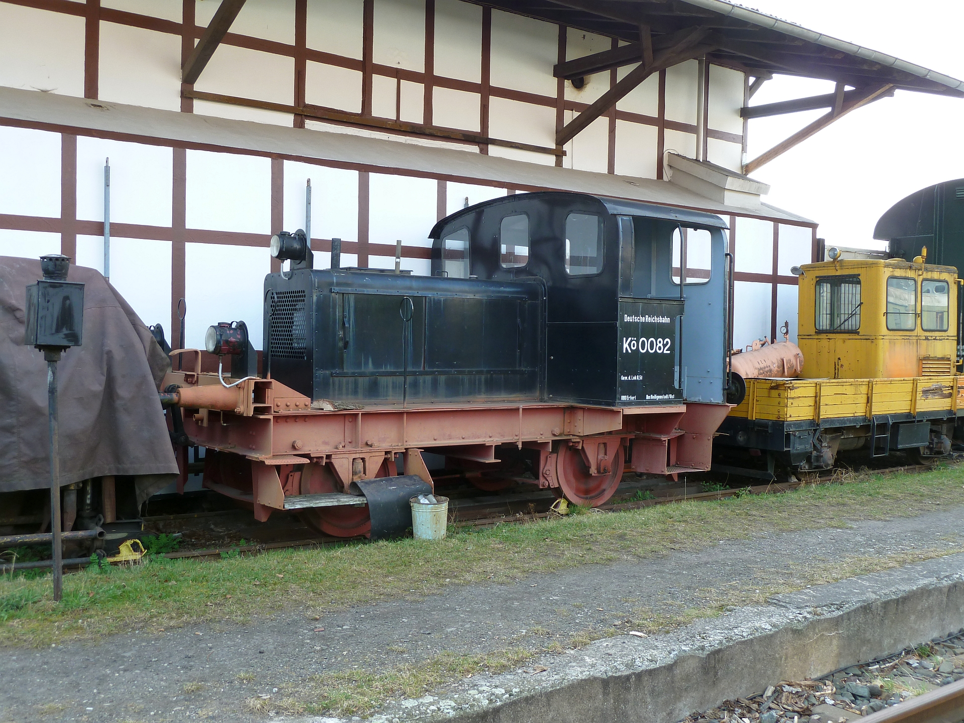 DGR Kö 0082 (Windhoff 250/1934), Heilbad Heiligenstadt/Ostbahnhof, Eisenbahnfreunde, 24.03.2012